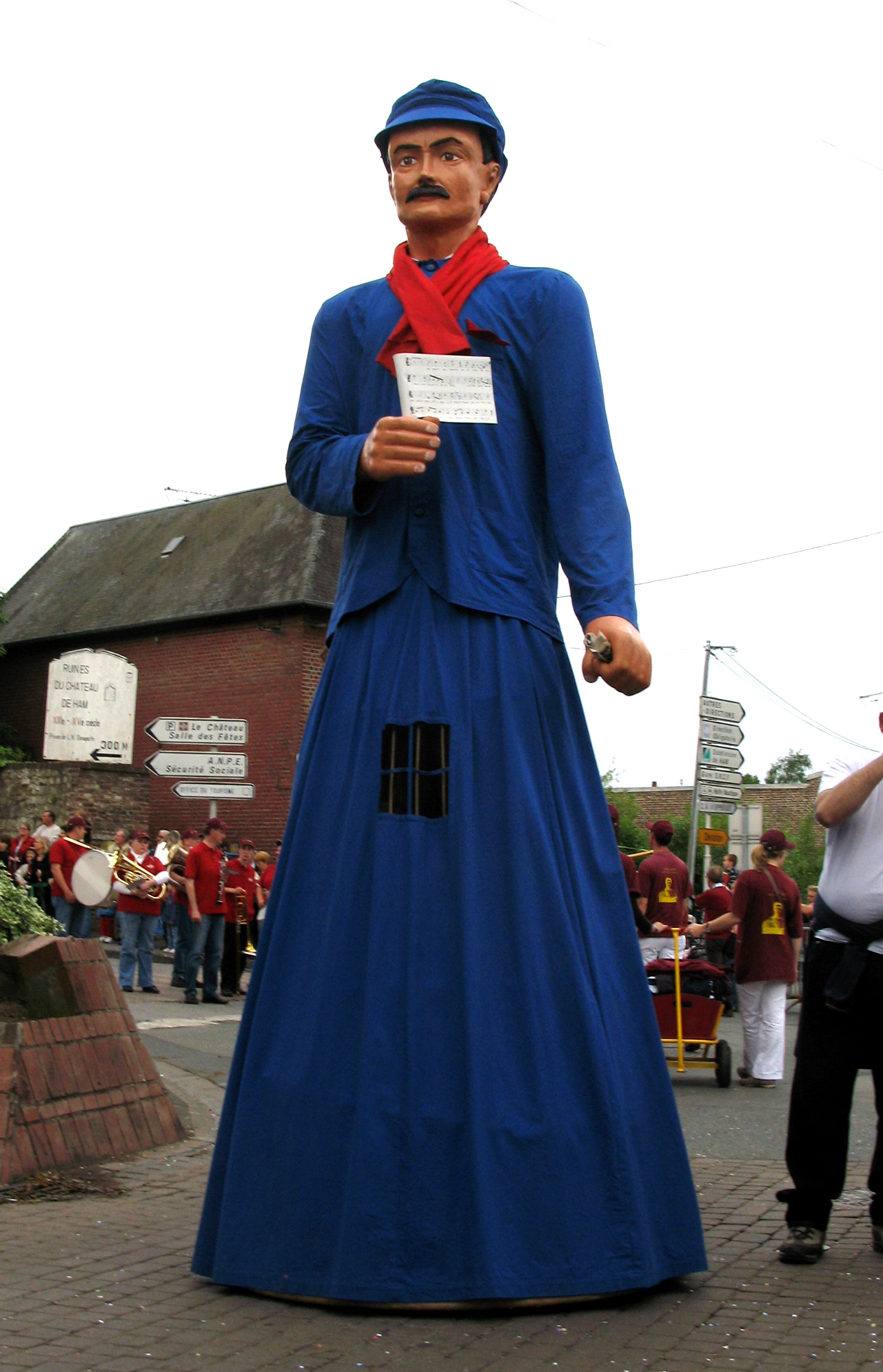 Ham (Somme, France) - Animation festive au centre-ville, un dimanche de printemps. Le géant Pierre de Geyter, après avoir descendu la rue du Château, rejoint la rue de Noyon. .